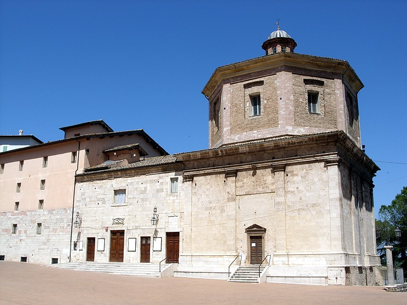 Spoleto - Chiesa di S. Maria della Manna d'Oro